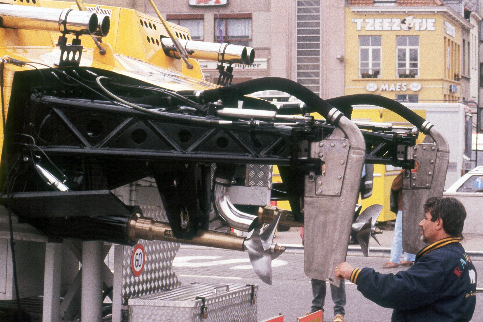 Oberflächenantrieb an einem Offshorerennboot der Class 1